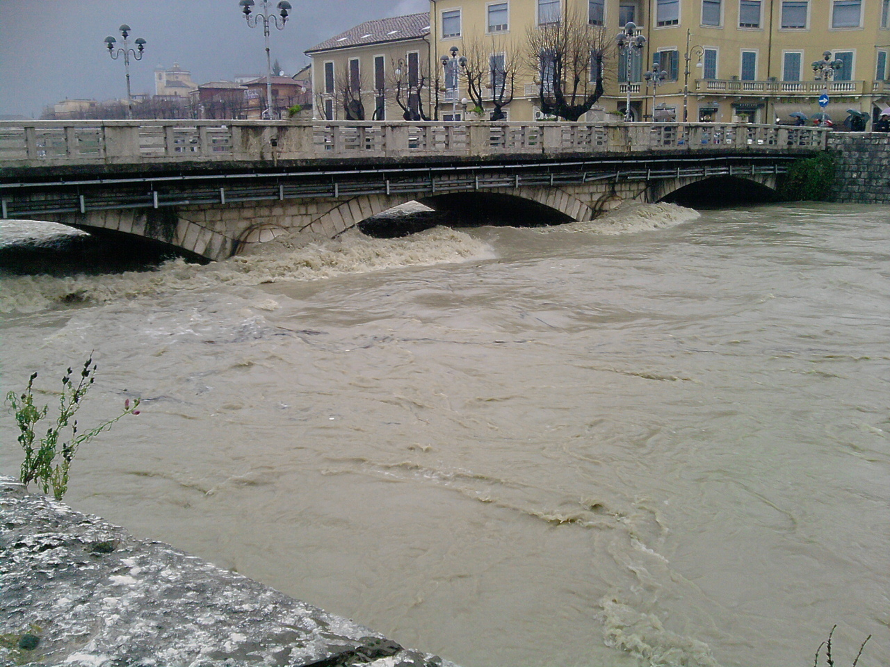 Il fiume Liri nella piena del 01/12/2010.